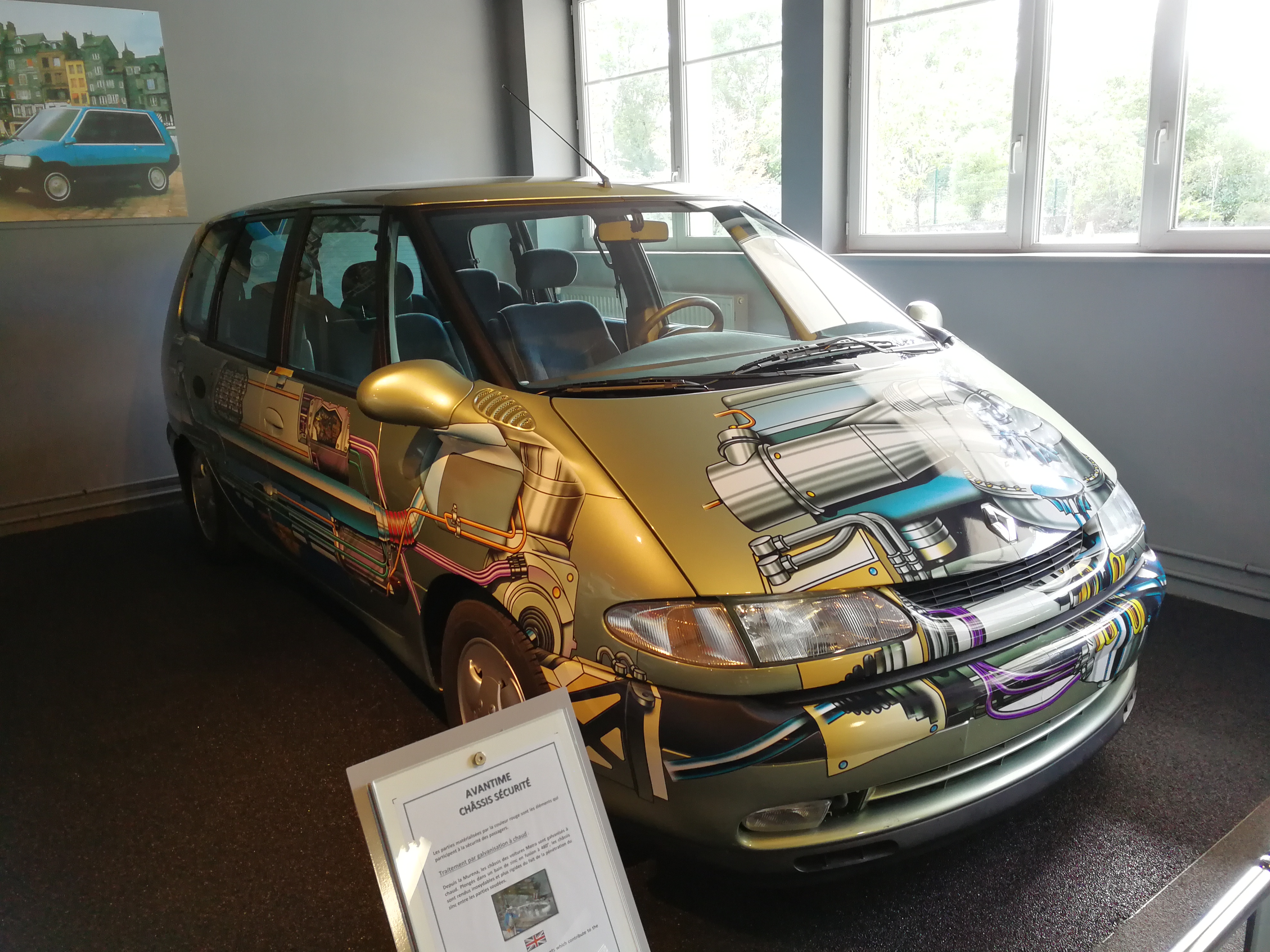 Véhicule bi-energies.